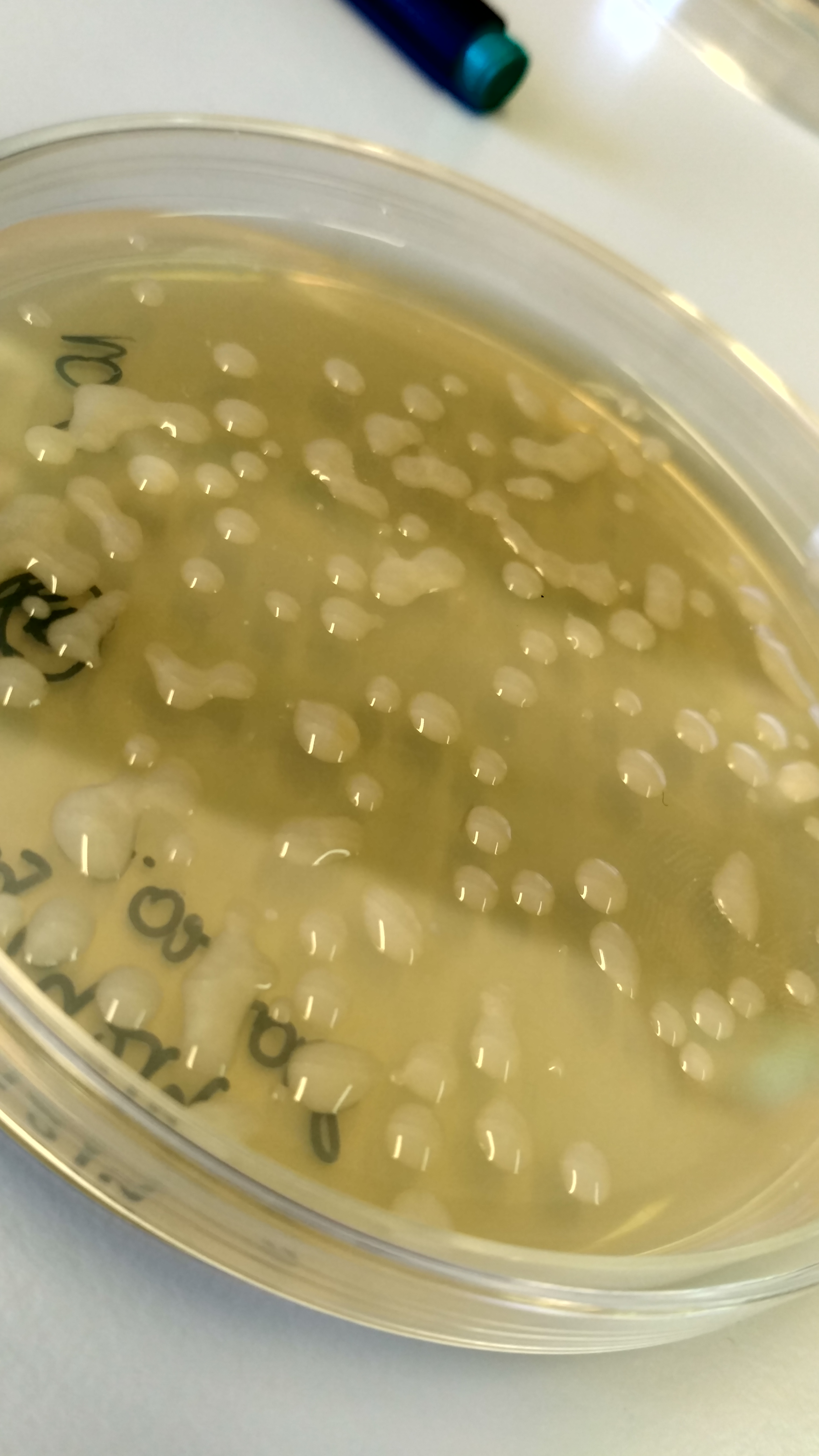 Śluzowate kolonie Paracoccus yeei (szczep CCUG 54214) wysiane na podłoże LB.